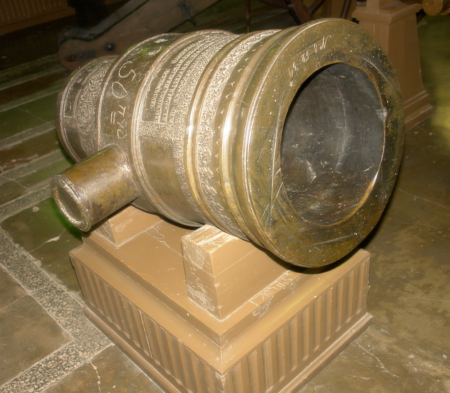 СТВОЛ 3-ПУДОВОЙ (330-мм) ПОЛЕВОЙ МОРТИРЫ Ствол бронзовый. Длина — 97 см. Масса — 865,7 кг. Отлит в 1698 г. в городе Глухове мастером Карпом Иосифовичем.